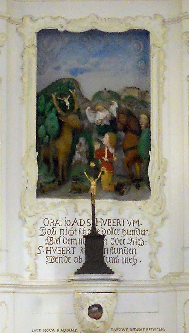 Hubertuskapelle in Altenbrilon, Hubertuswunder mit Reliquie unterhalb